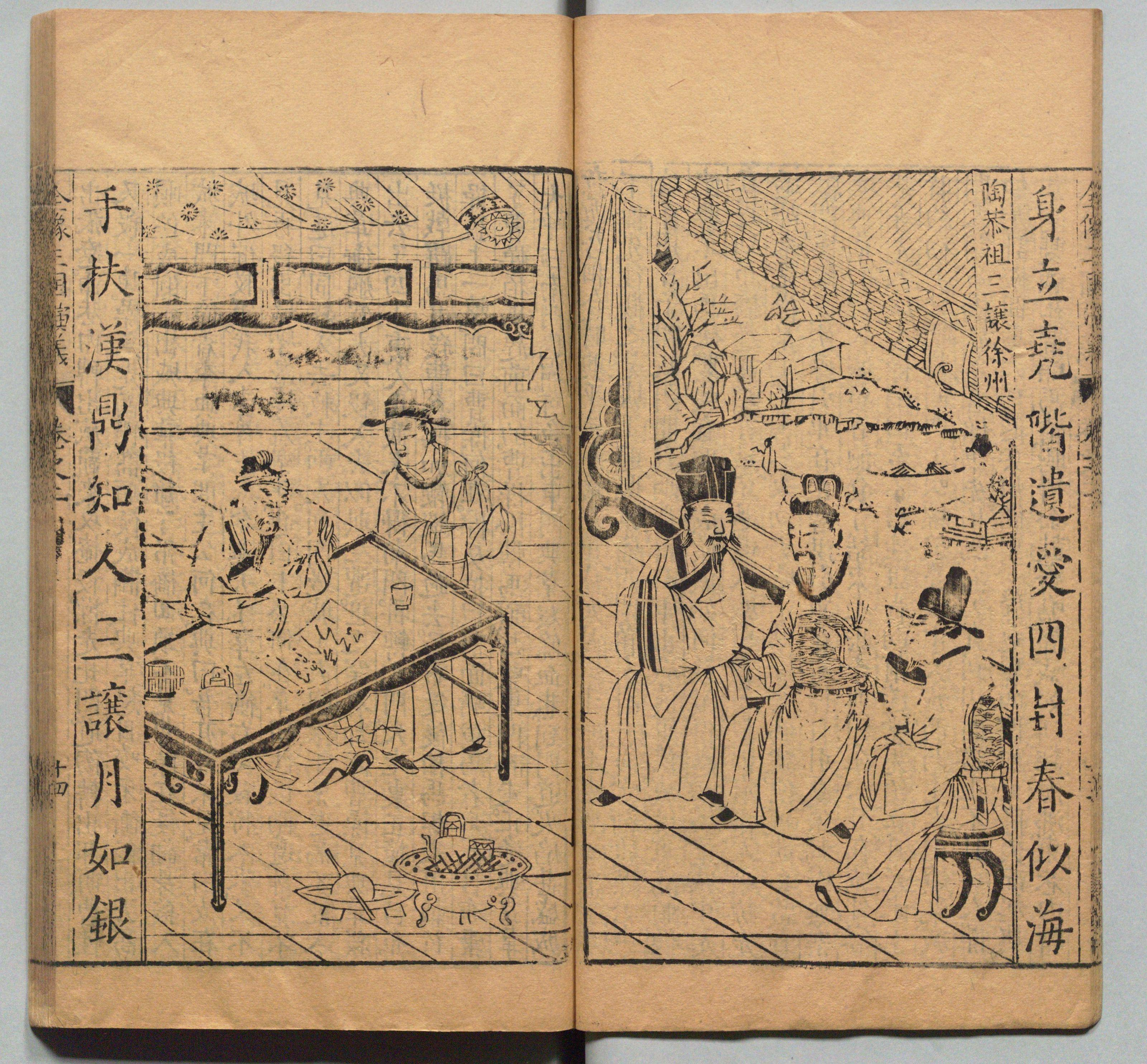 《新刊校正古本大字音释三国志通俗演义》 明万历十九年书林周曰校刊本